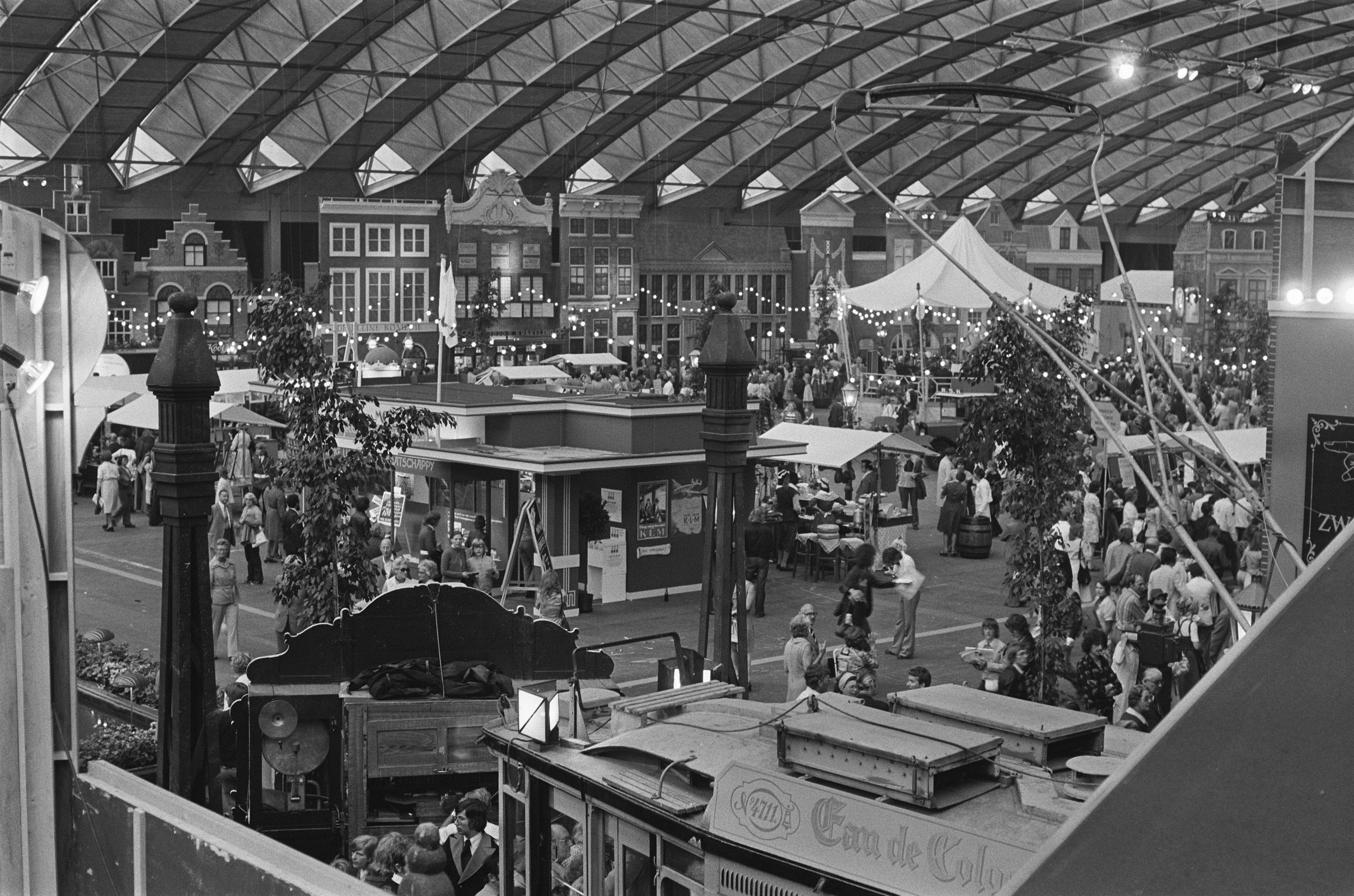 Collectie / Archief : Fotocollectie Anefo Reportage / Serie : Mokum 700 geopend in de RAI in Amsterdam Beschrijving : Overzicht van de drukte op Mokum 700 Datum : 24 juni 1975 Locatie : Amsterdam, Noord-Holland Trefwoorden : decors, manifestaties Fotograaf : Fotograaf Onbekend / Anefo Auteursrechthebbende : Nationaal Archief Materiaalsoort : Negatief (zwart/wit) Nummer archiefinventaris : bekijk toegang 2.24.01.05 Bestanddeelnummer : 928-0111